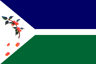 Bandera del municipio Monseñor José Vicente de Unda, estado Portuguesa, Venezuela